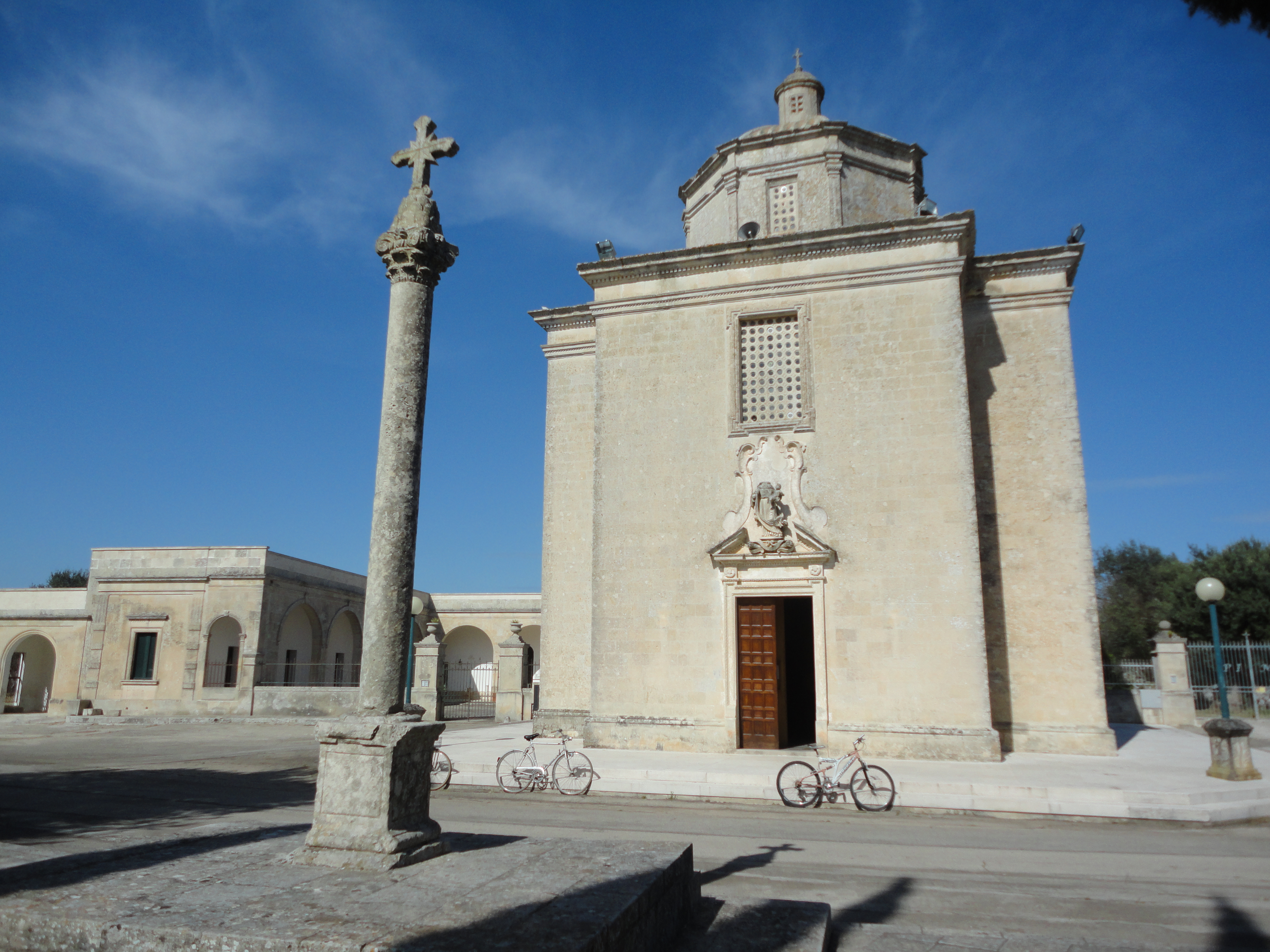 Chiesa santuario della Madonna dell'Abbondanza di Cursi, Lecce